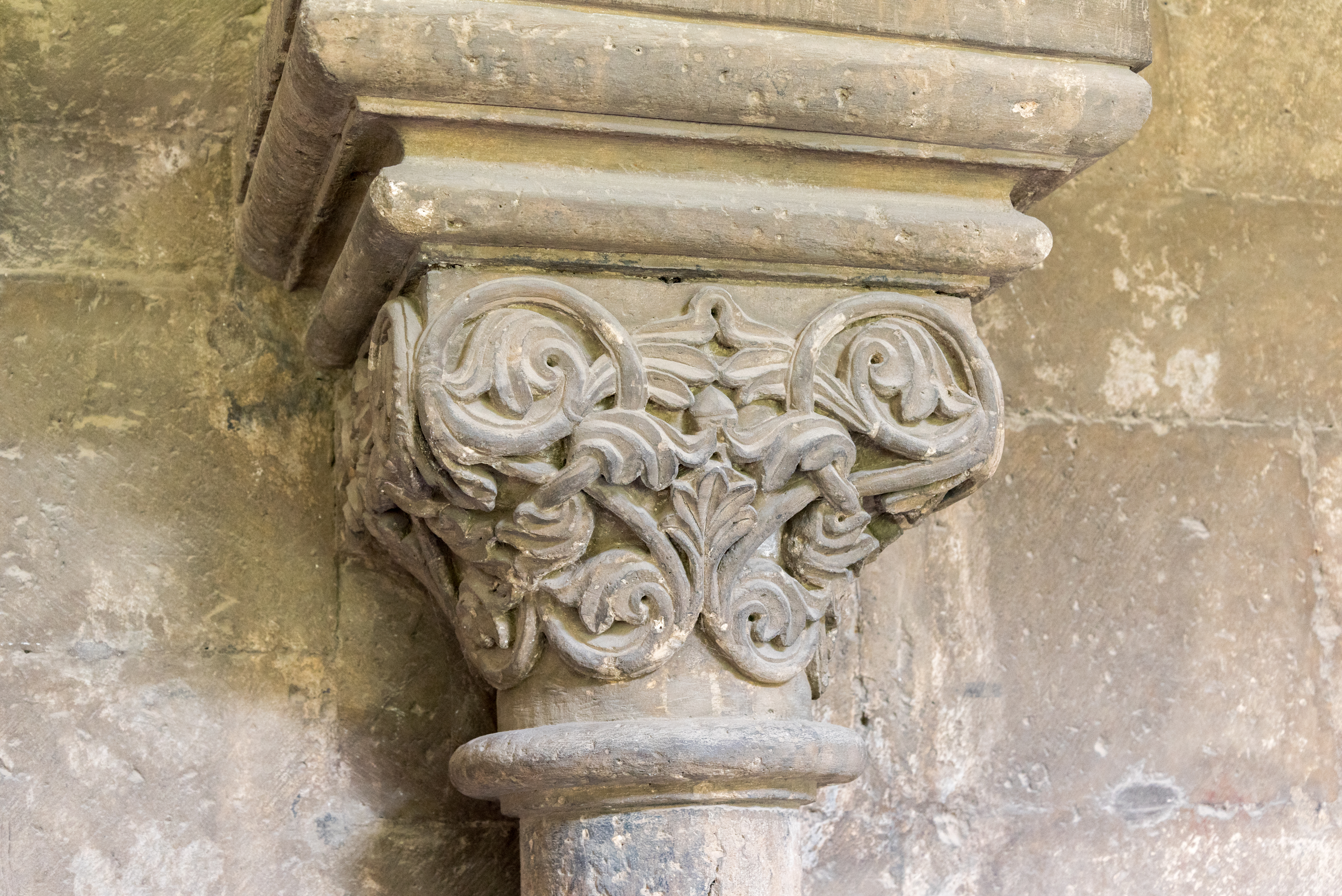 Naumburg an der Saale, Dom, Innenraum